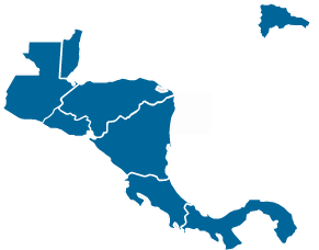 Mapa de los paises miembros del Sistema de Integracion Centroamericno